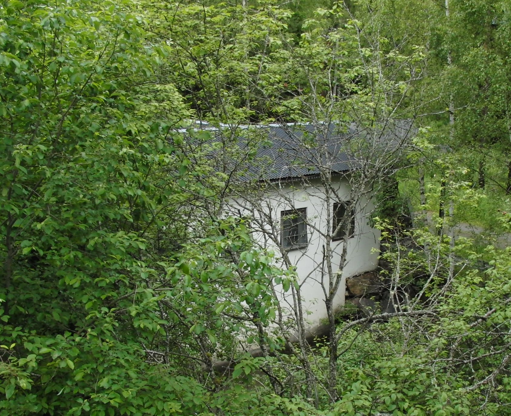 Heierenfossen kraftverk